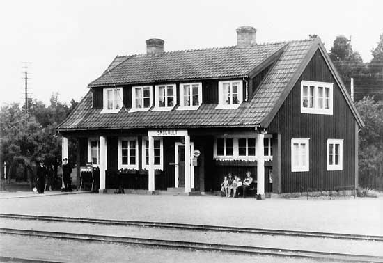 Skoghult railway station, Mönsterås-Åseda Järnväg, Sweden